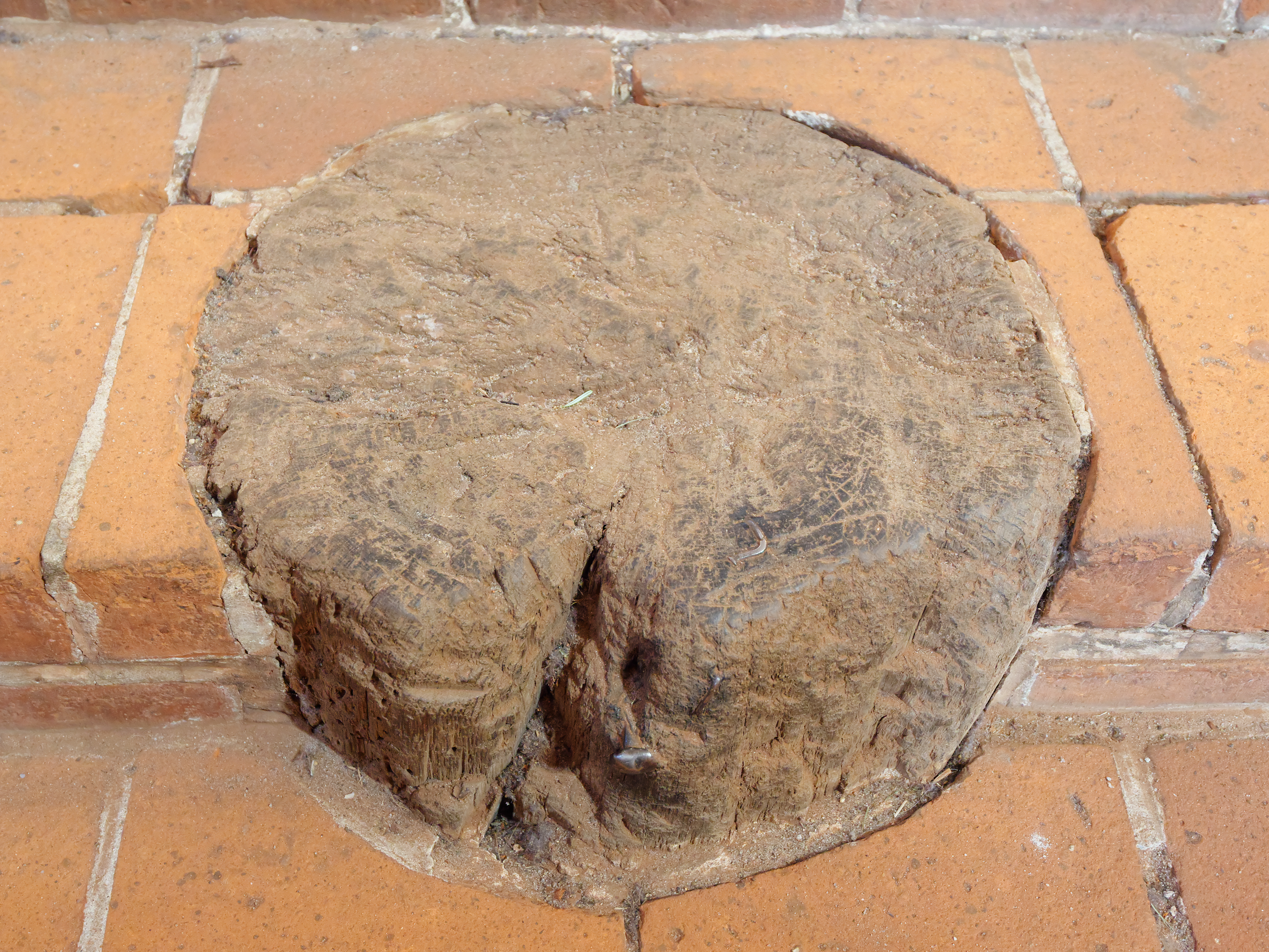 Kloster Lehnin, verkieselter Eichenstamm in den Treppenstufen des Altarraums der Kirche.